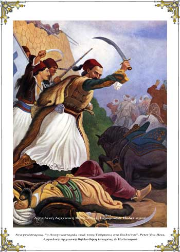 Αναγνωσταράς, «ο Αναγνωσταράς νικά τους Τούρκους στο Βαλτέτσι»